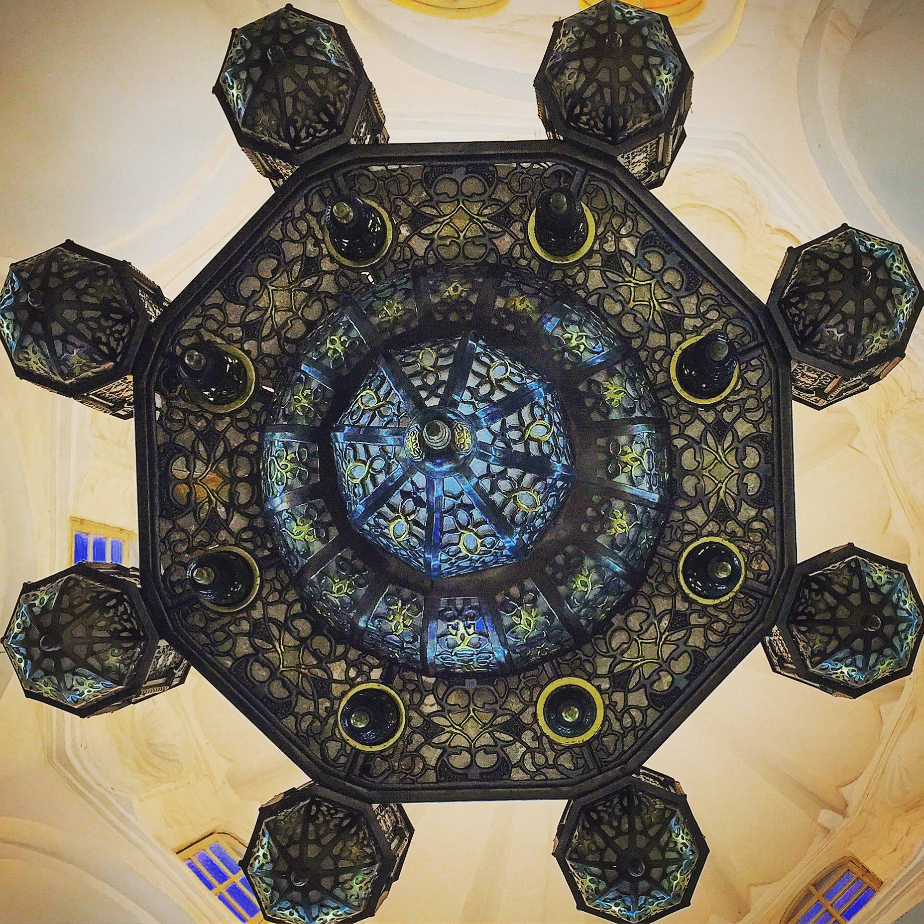 أحد الثريات المعلقة في بناء ضريح صلاح الدين الأيوبي .